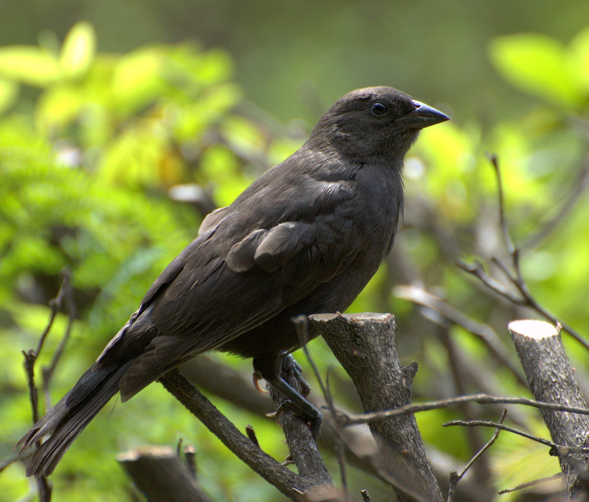 Parque da Independência, Museu do Ipiranga, São Paulo